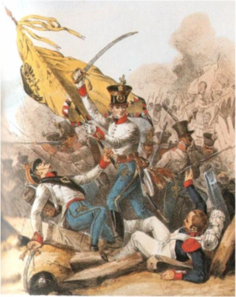 k.k. ungarische Infanterie Mitte des 19. Jahrhunderts